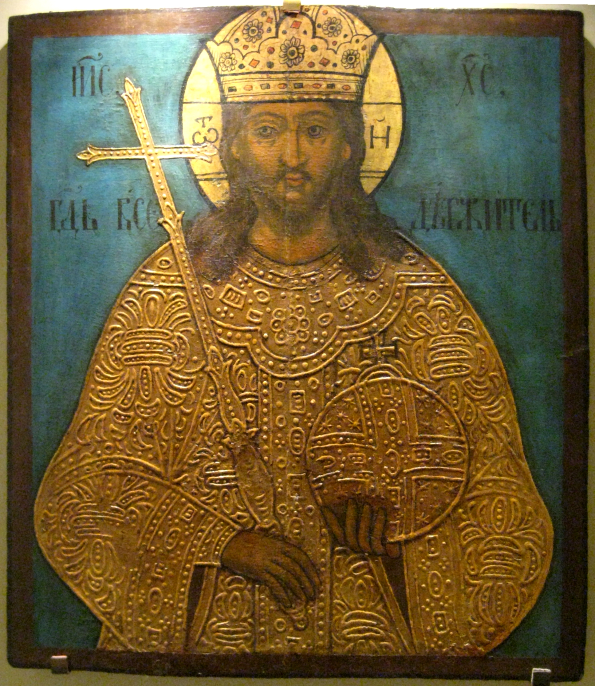 Спас Вседержитель. 1-я пол. 18 века